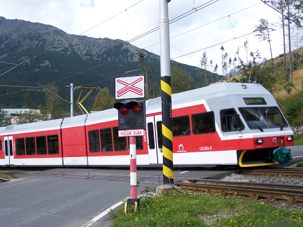 TEŽ